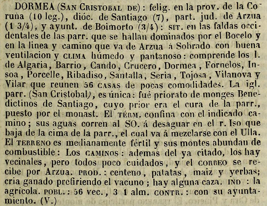 Dormeá no Diccionario geográfico-estadístico-histórico de España y sus posesiones de Ultramar.